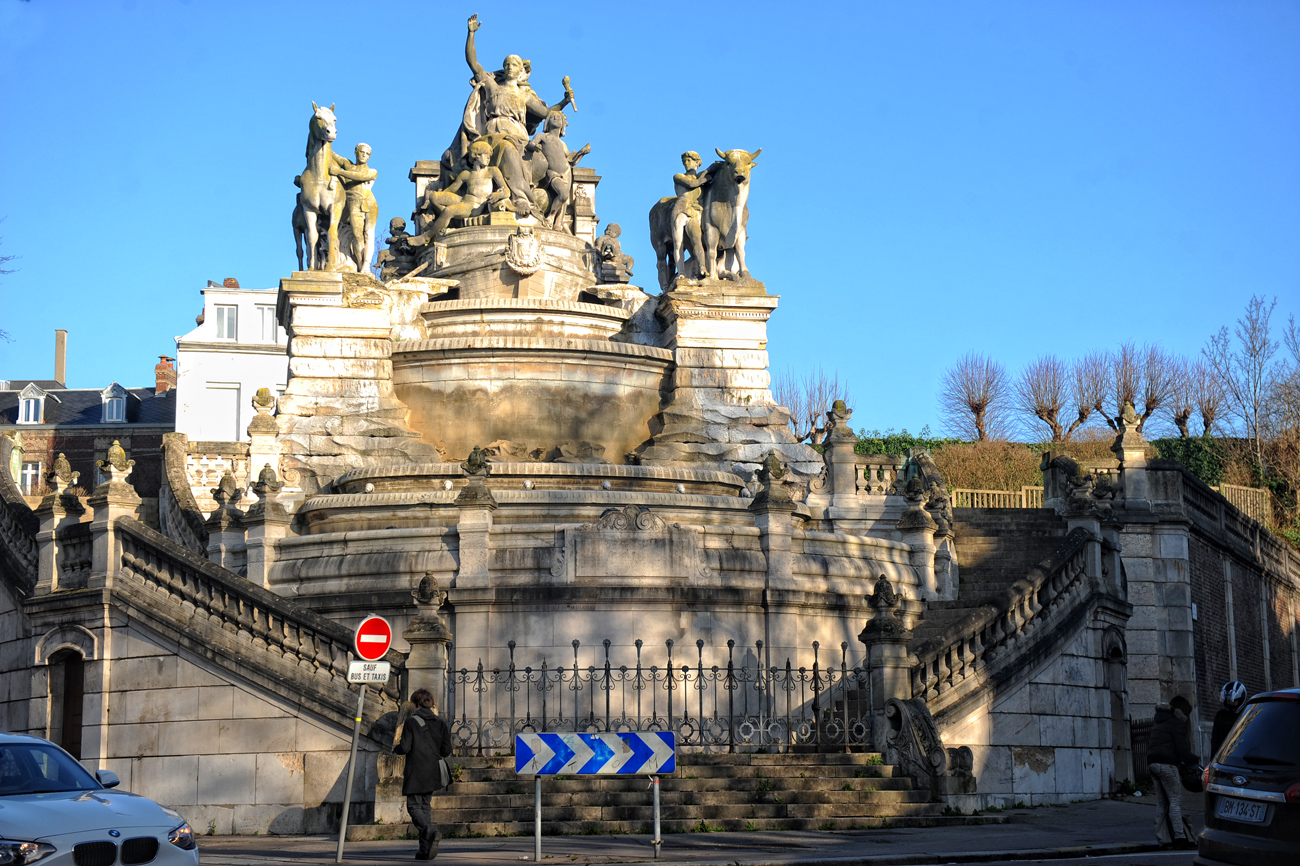 Fontaine Sainte-Marie 14-01-2012